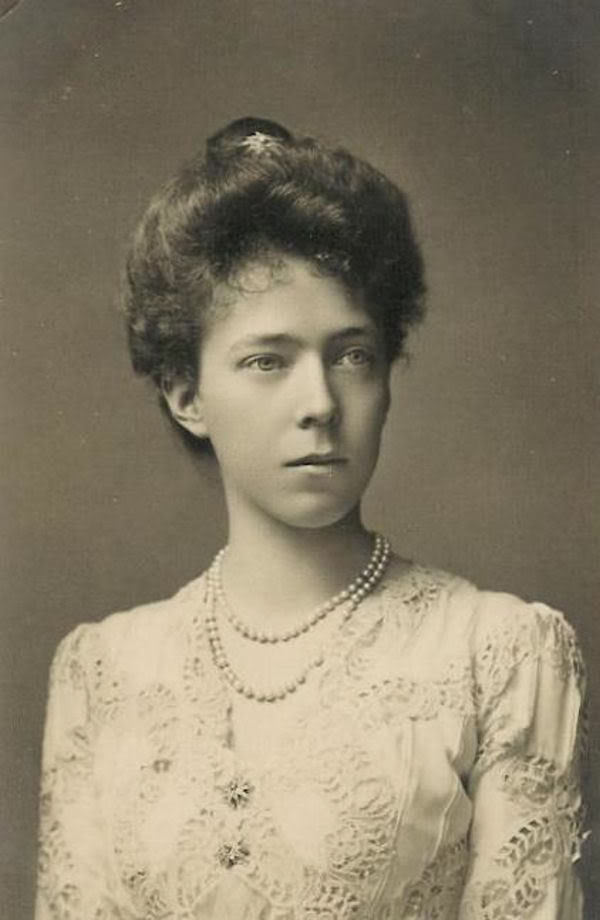 Duchess Elisabeth Gabrielle Valérie Marie in Bavaria (later Elisabeth, Queen of Belgium)